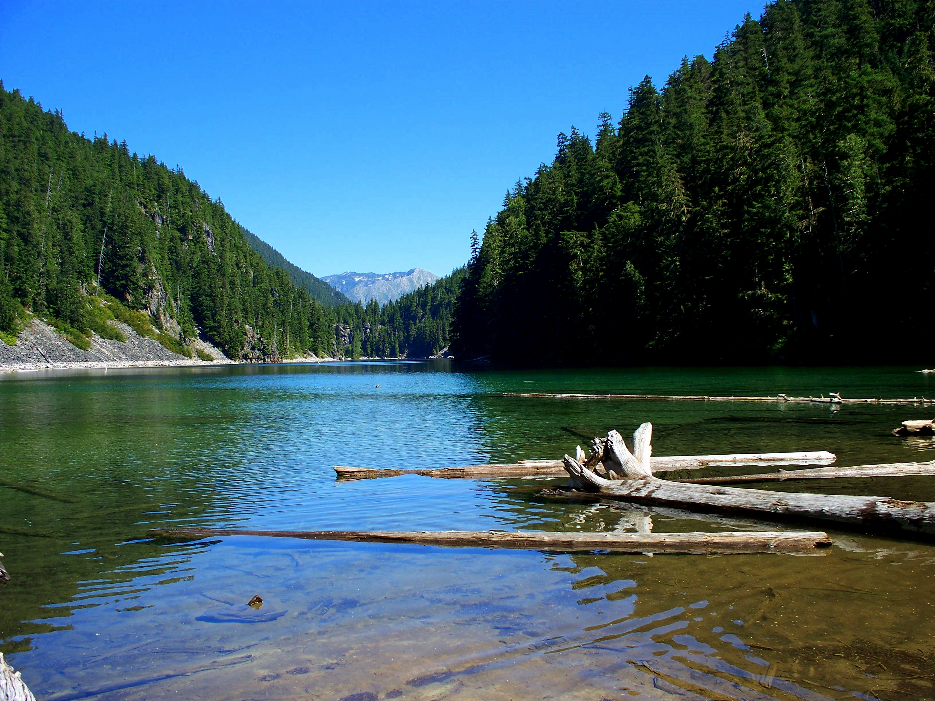 Greendrop Lake in Chilliwack Lake Provincial Park